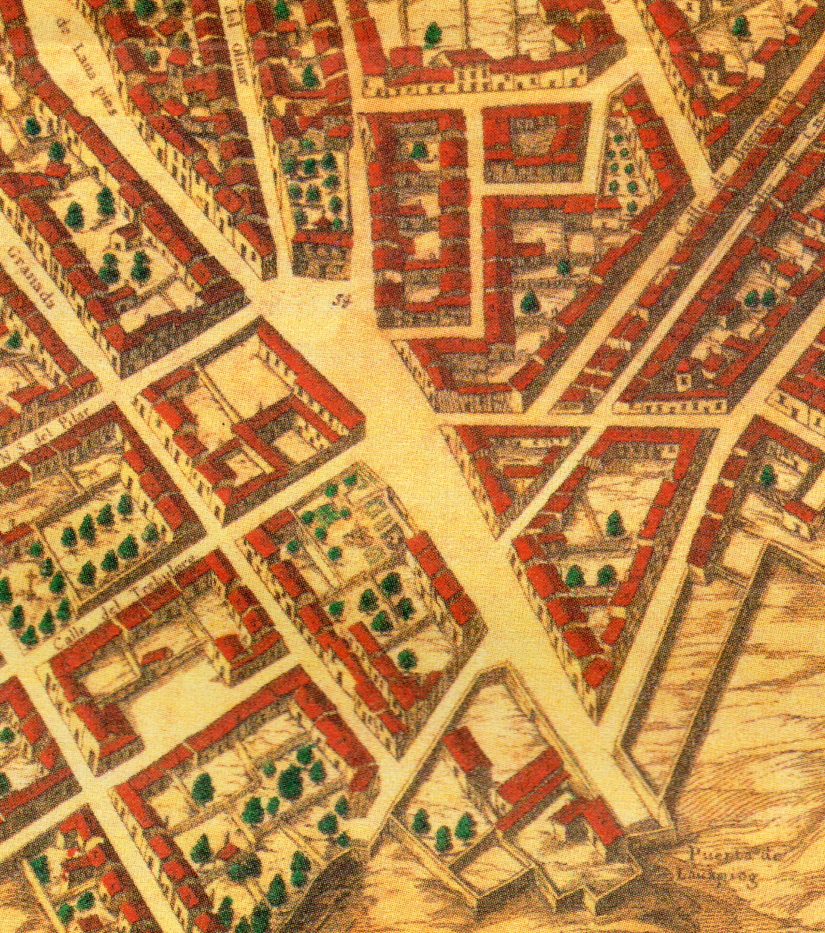 Topografía de la Villa de Madrid descrita por Don Pedro Texeira en 1656, en la cual se demuestran todas las calles al largo y ancho de cada una de ellas, las rinconadas y lo que tuercen las Plazas, fuentes, jardines y huertas con la disposición que tienen las parroquias, Monasterios y Hospitales están señalados sus nombres con letras y números que se hallaran en la tabla y los demás edificios, torres y delanteras de las casas de la parte que mira al Mediodía están sacadas al natural que se podrán tocar las puertas y ventanas de cada una de ellas.